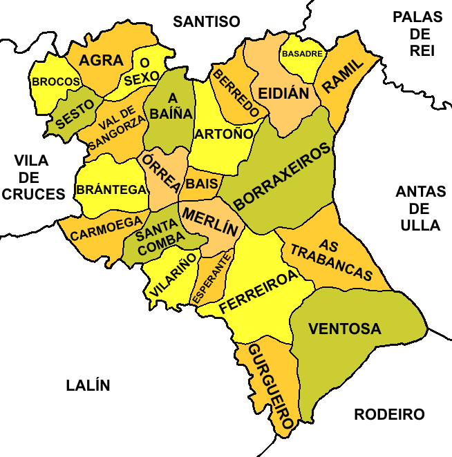 Parroquias do concello de Agolada (Provincia de Pontevedra)